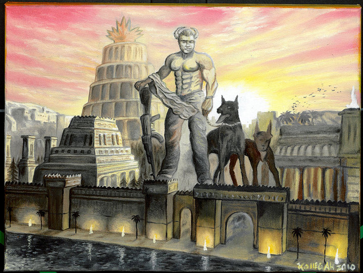 Gemälde des Rappers Kollegah